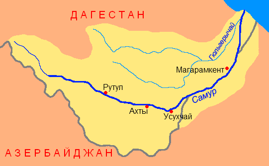 Схема бассейна реки Самур